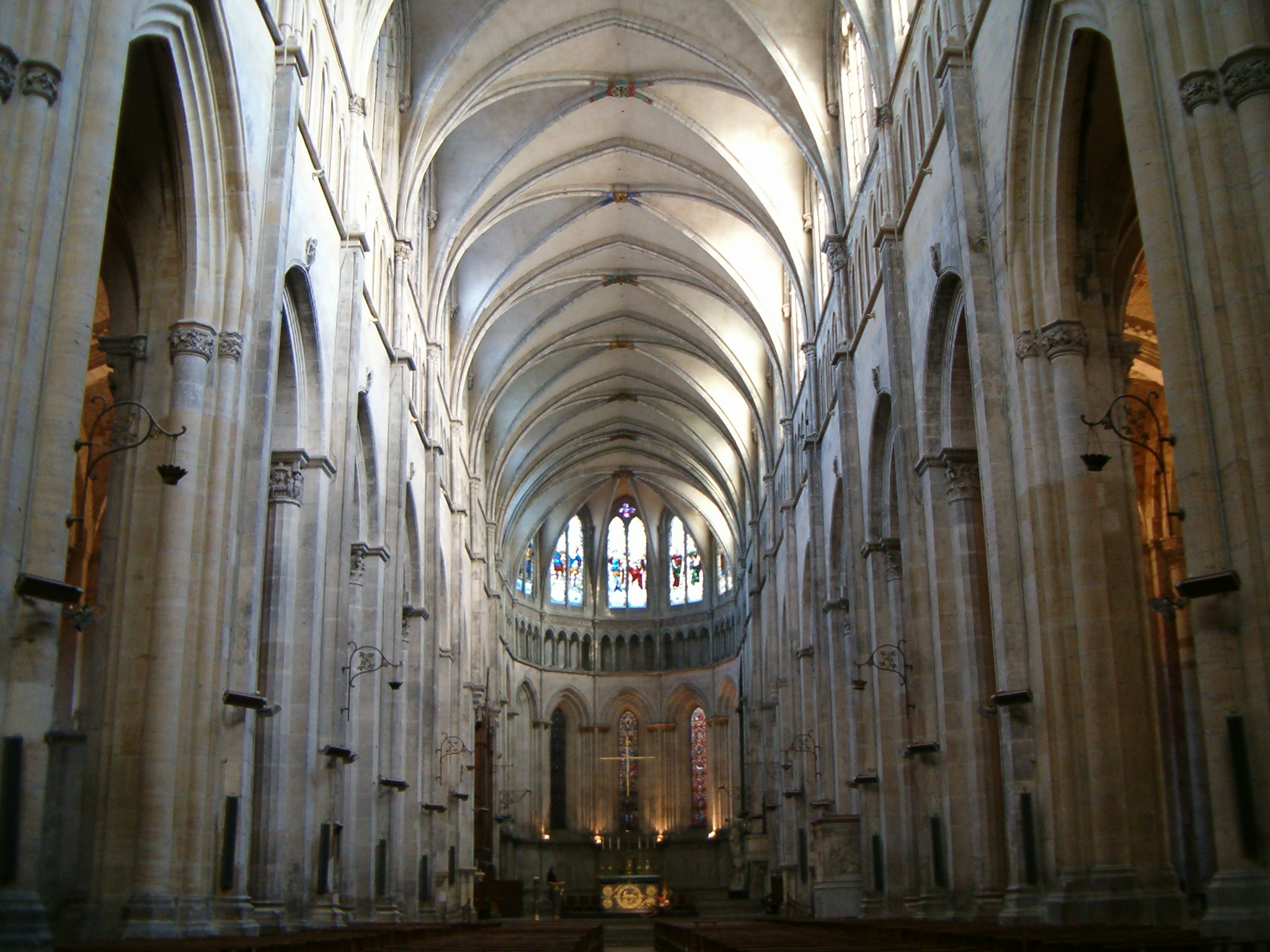 Nef de la Cathédrale Saint-Maurice de Vienne. Janvier 2007.